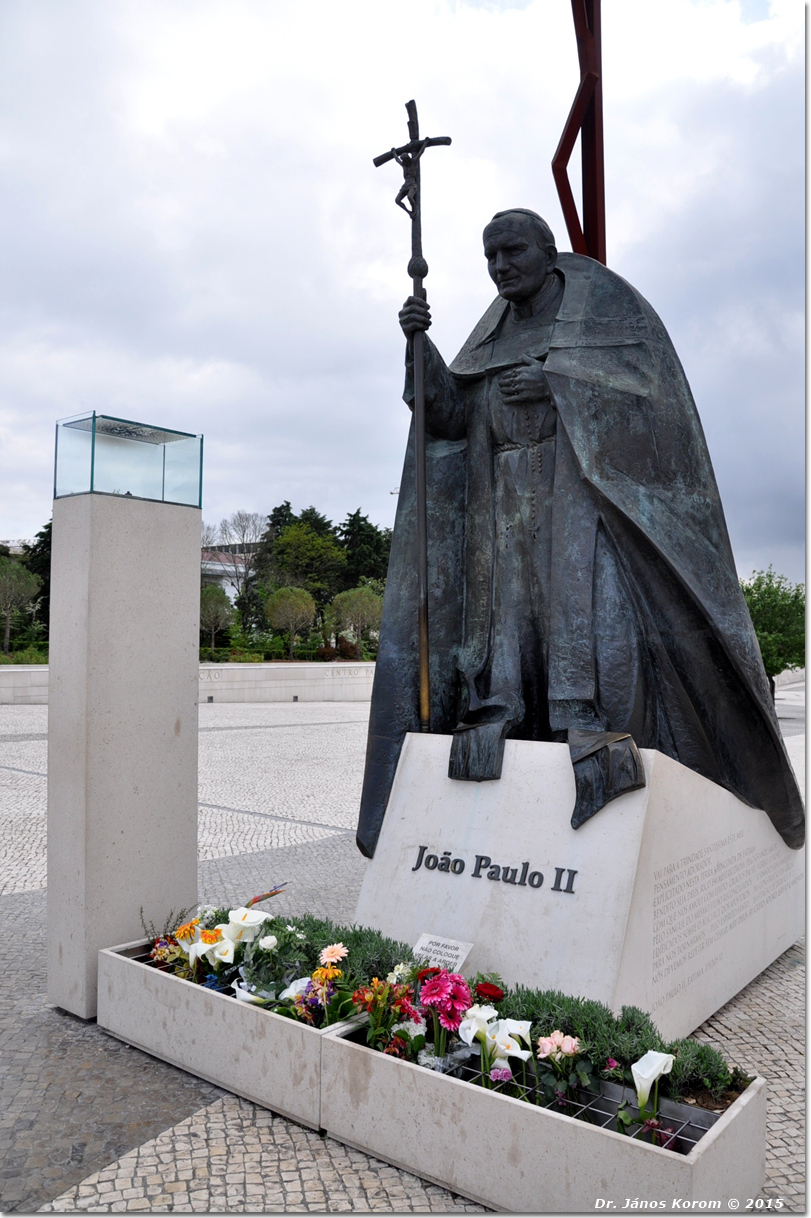 Statue des heiligen Johannes Paul´s II. auf dem großen Platz des Heiligtums von Fatima